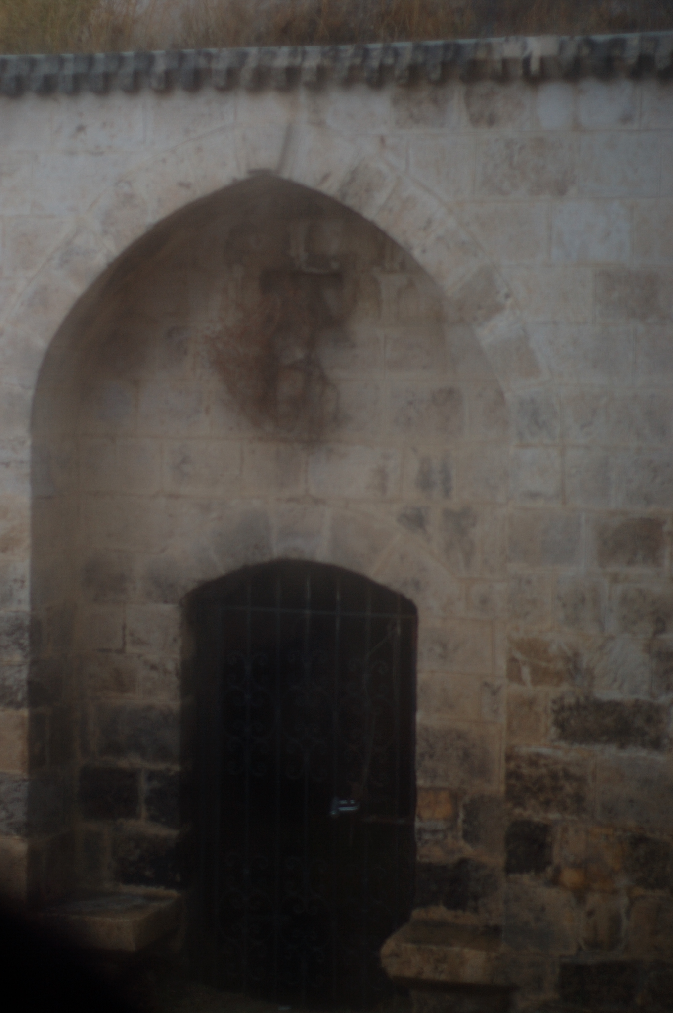 העיר העתיקה של רמלה